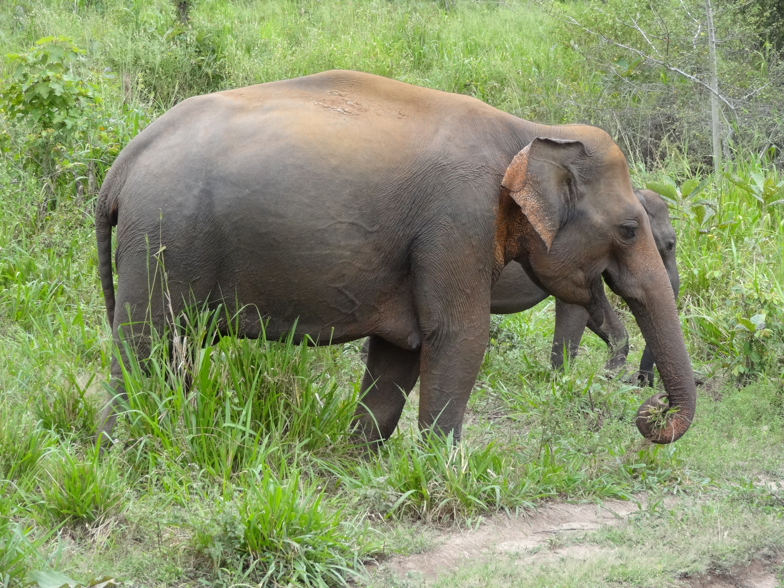 Elephas maximus maximus in Hurulu Eco Park